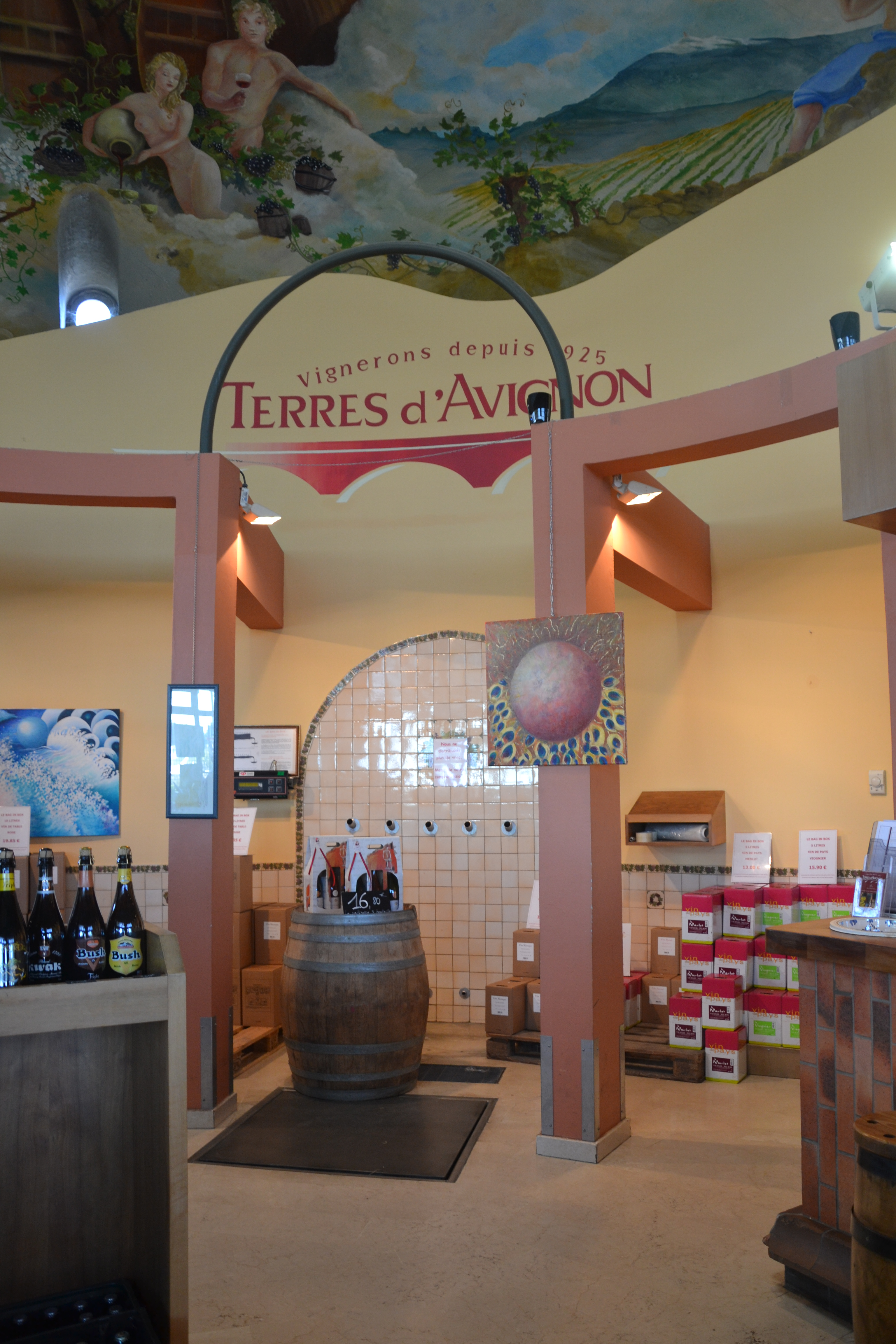 Cave coopérative viticole de Morières-lès-Avignon : vente au vrac